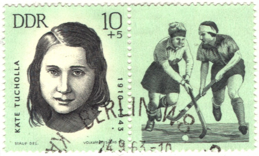 Käte (auch: Käthe) Tucholla auf einer DDR-Briefmarke von 1963